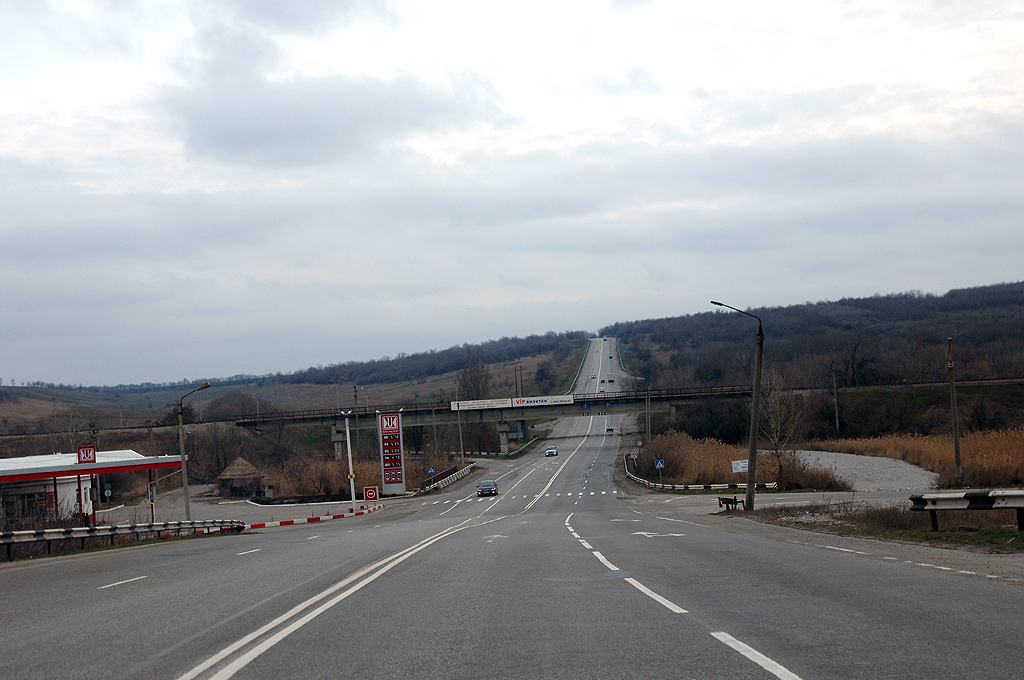 путипровод на Степногорск